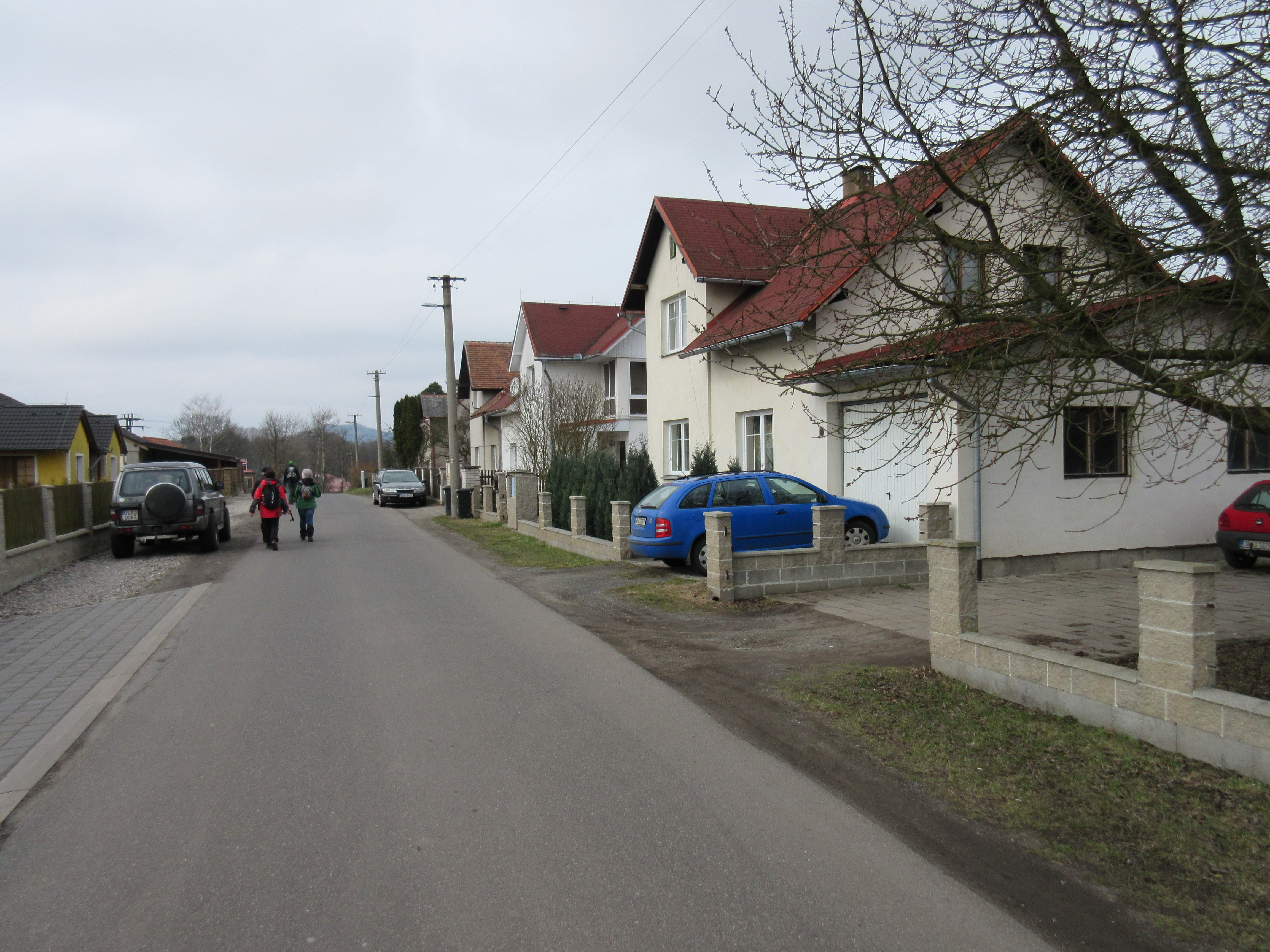 Nová část obce